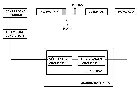 Shema Mossbauerovog spektrometra